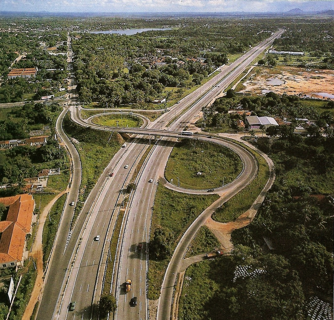 Vista aérea do viaduto da messejana na BR116 em Fortaleza